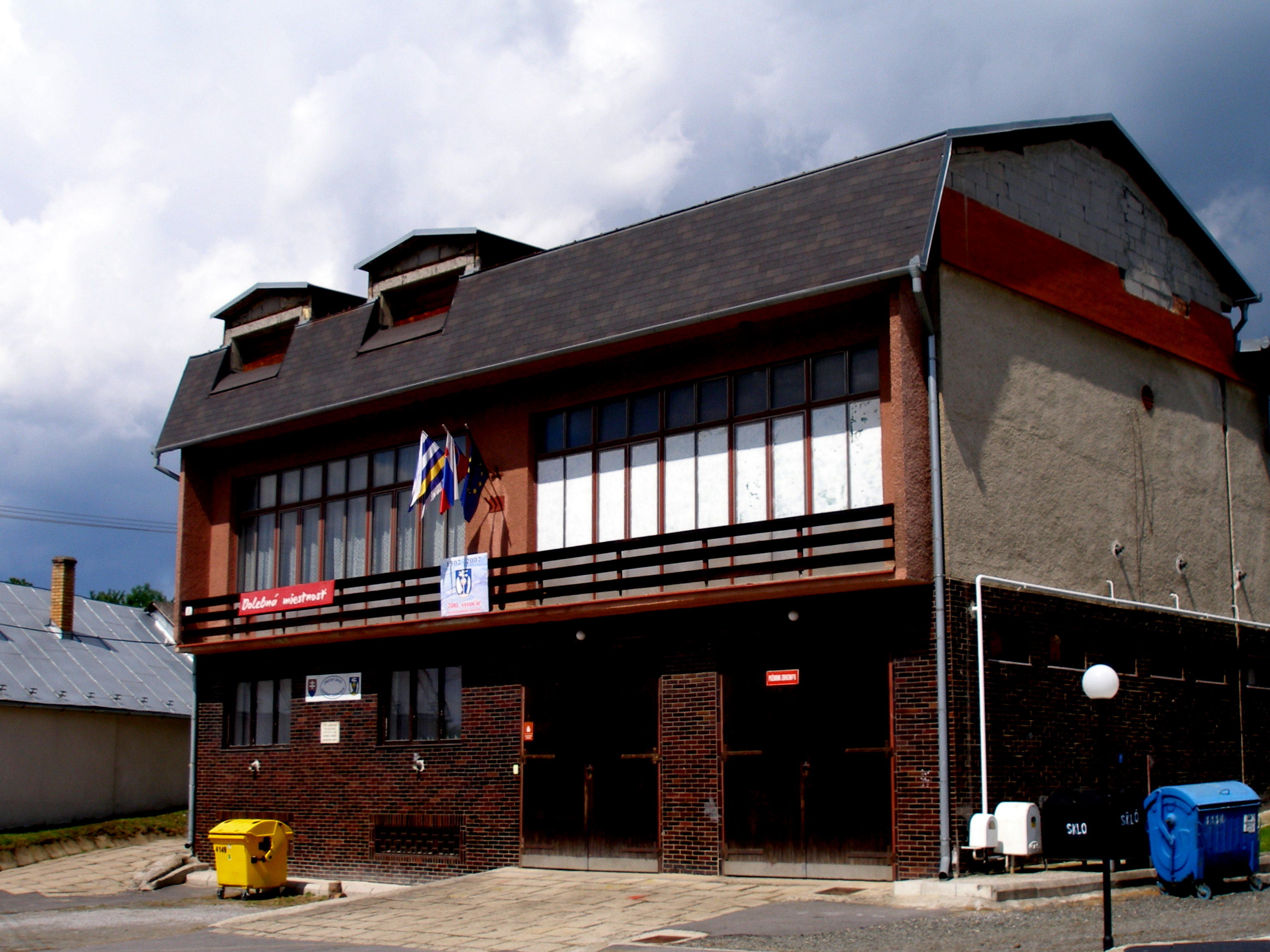 Obec Šarišské Sokolovce okres Sabinov.